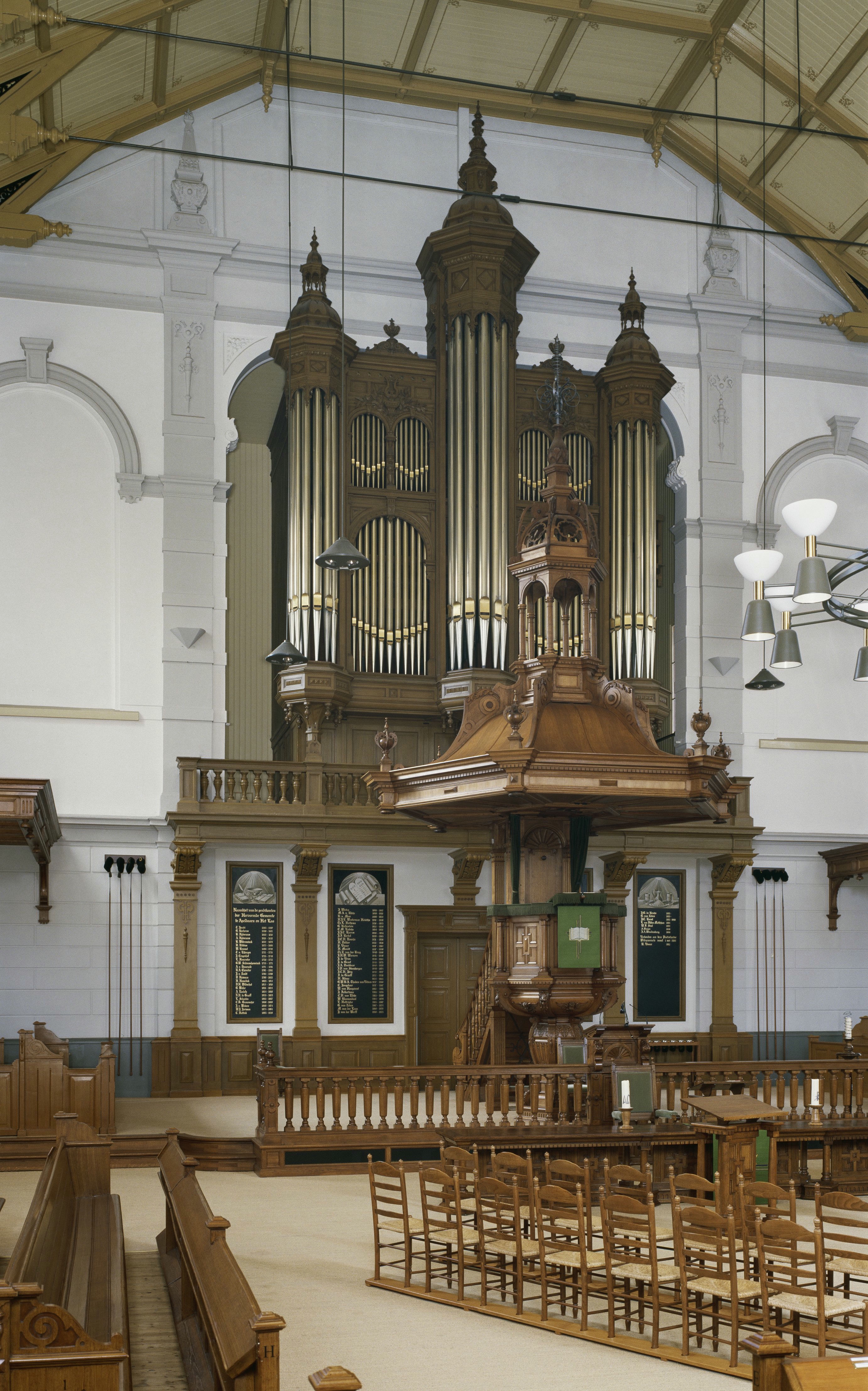 Grote Kerk: Interieur, aanzicht orgel, orgelnummer 85 (opmerking: Gefotografeerd voor Het Historische Orgel in Nederland 1894-1901, bladzijde 94)